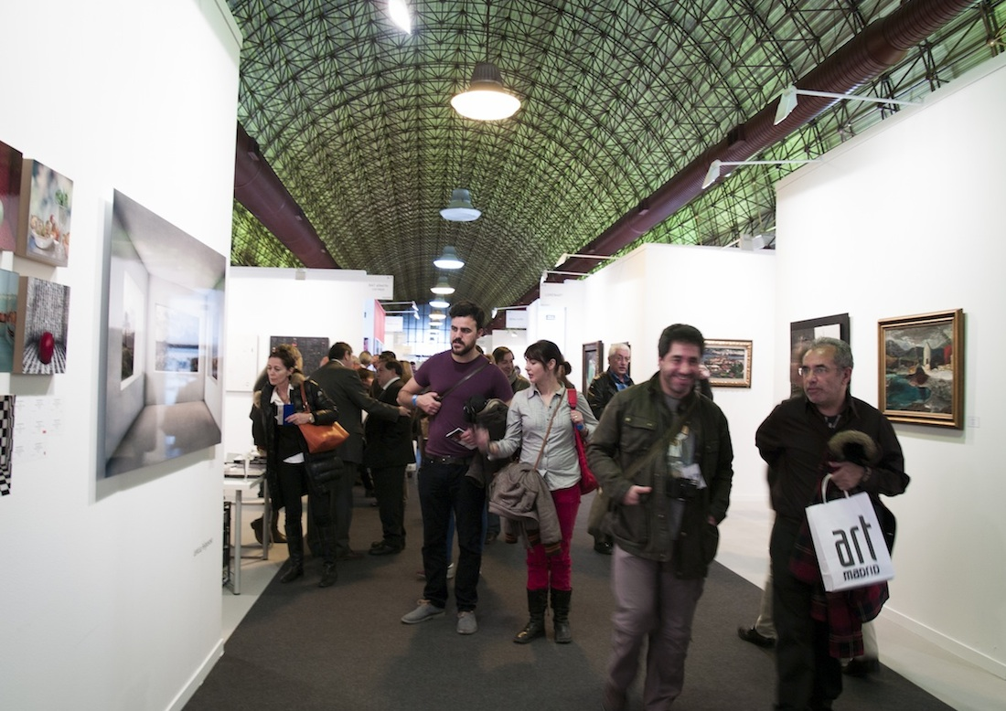 Feria Art Madrid 13